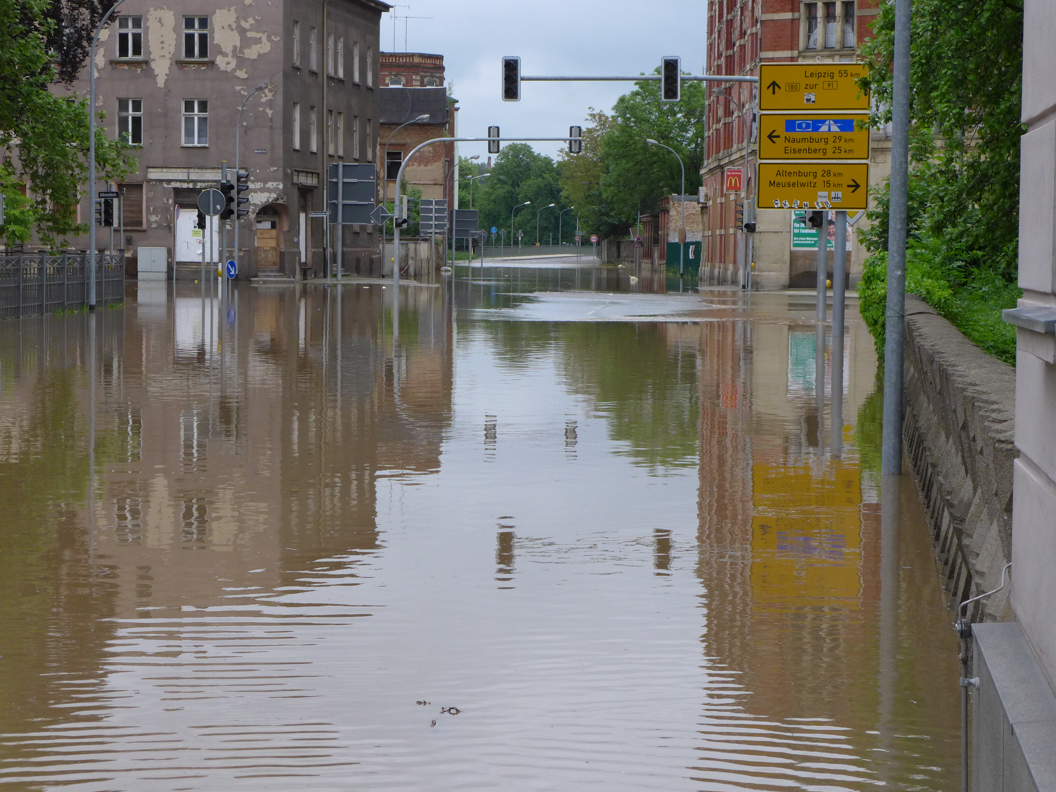 Hochwasser an der Weißen Elster. Zeitz, Badstubenvorstadt.